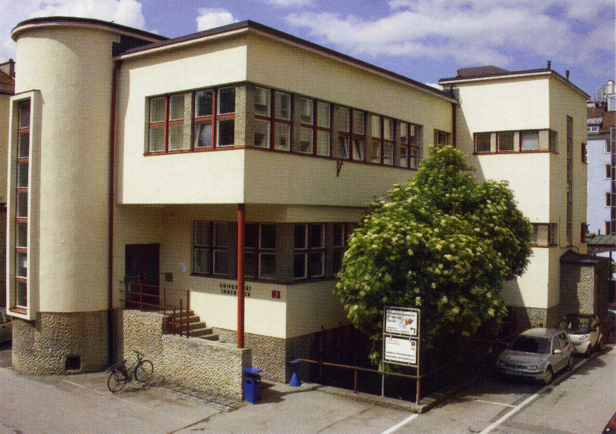 ehem. Arbeitsamt Schöpfstraße, erbaut 1931/32 nach Plänen von Theodor Prachensky